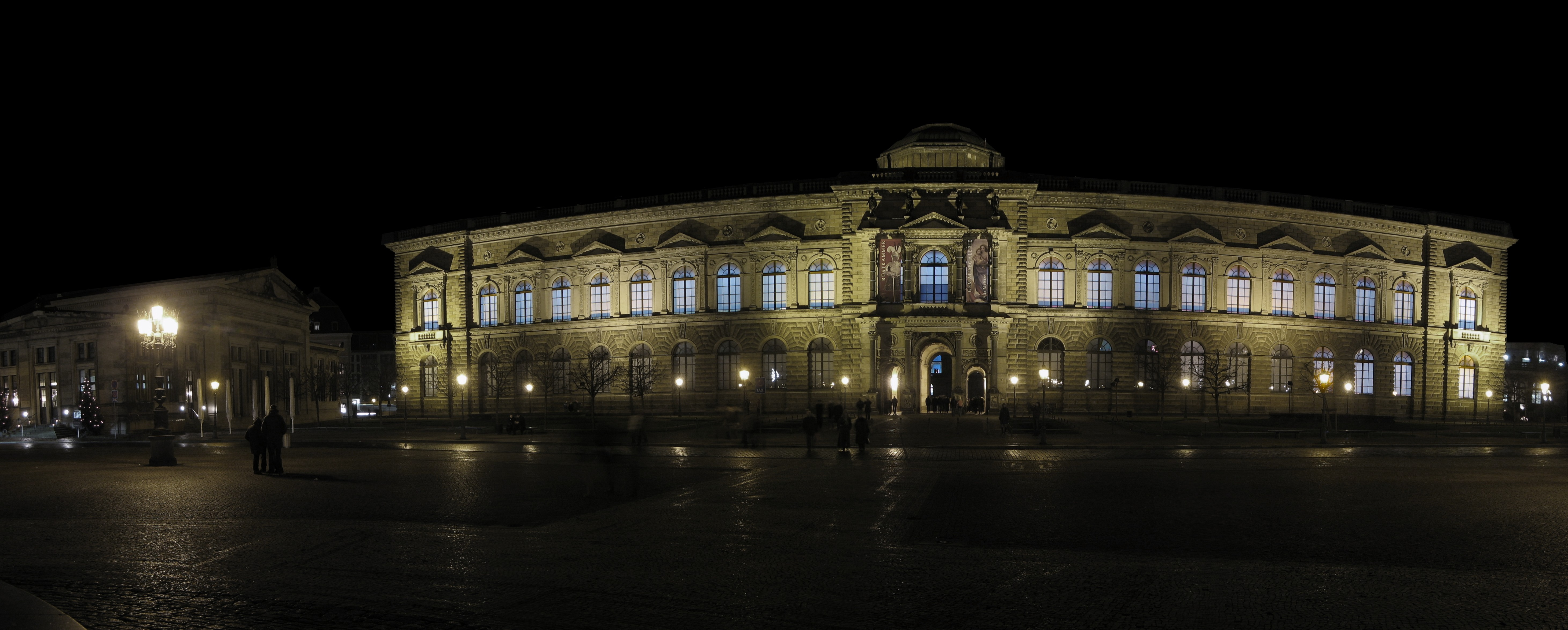 Fassade der Sempergalerie zum Theaterplatz (links: Schinkels Neue Wache)